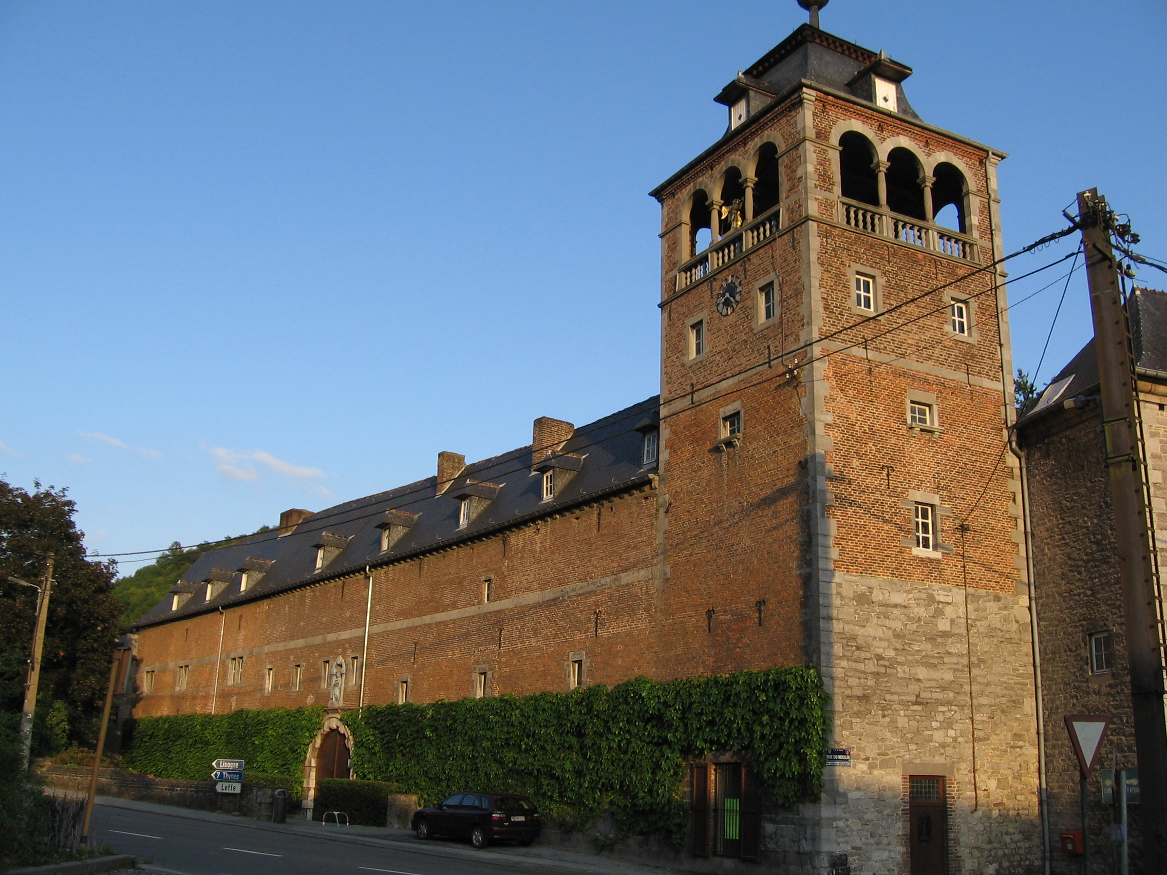 Batiment principal de l'abbaye prémontrée Notre-Dame de Leffe, à Leffe, Dinant (Belgique)